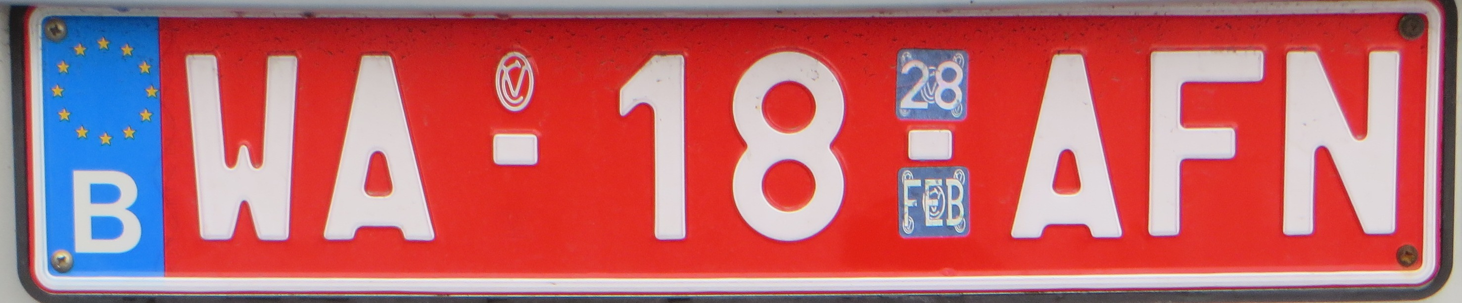 Tijdelijke plaat België